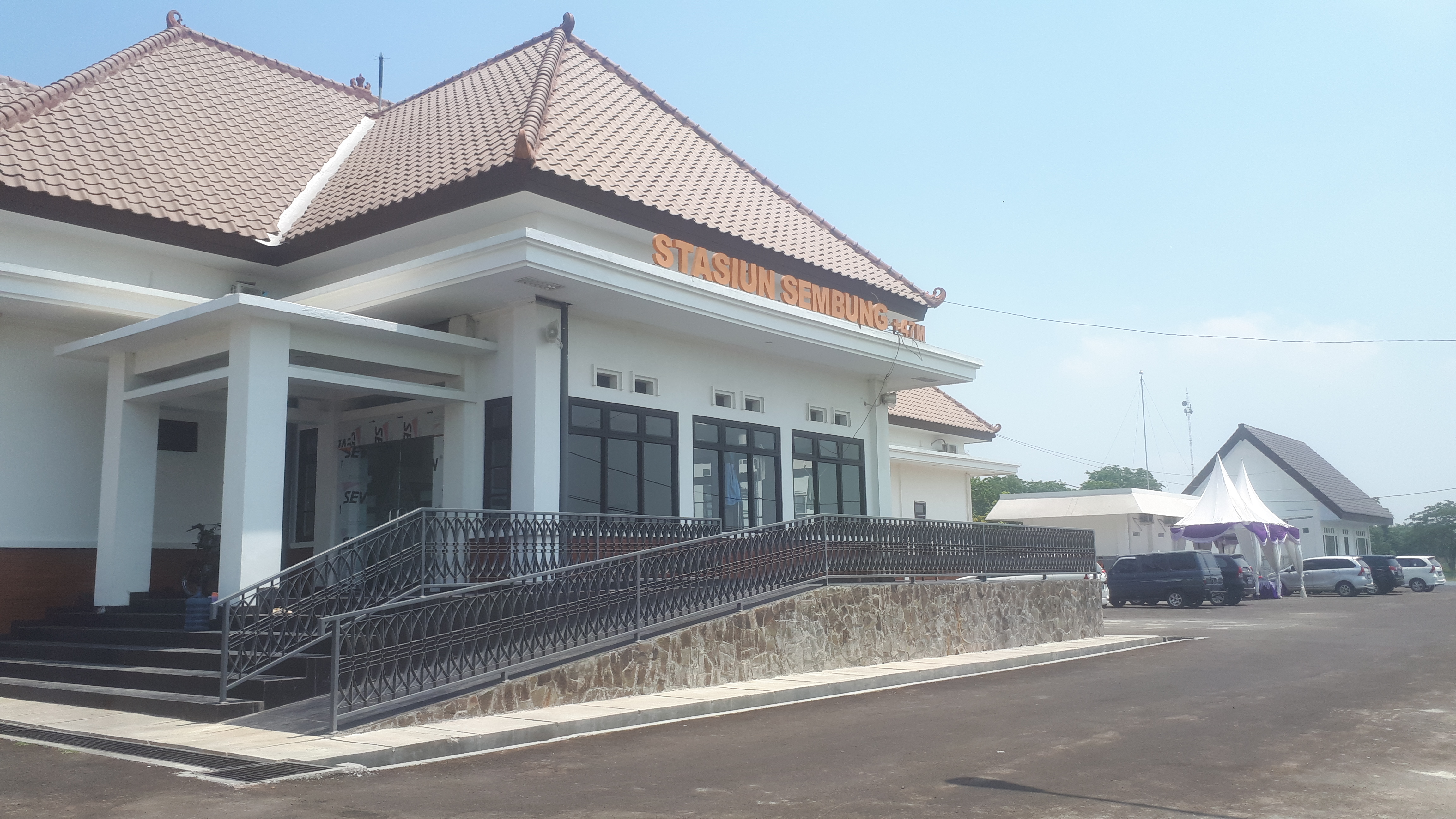 Stasiun Sembung baru mulai beroperasi pada 30 Oktober 2019 bersamaan dengan aktivasi rel jalur ganda Stasiun Baron–Stasiun Jombang